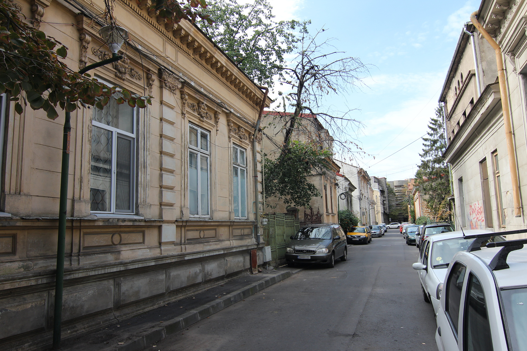 Ansamblul de arhitectură "Str. Stelea Spătarul"